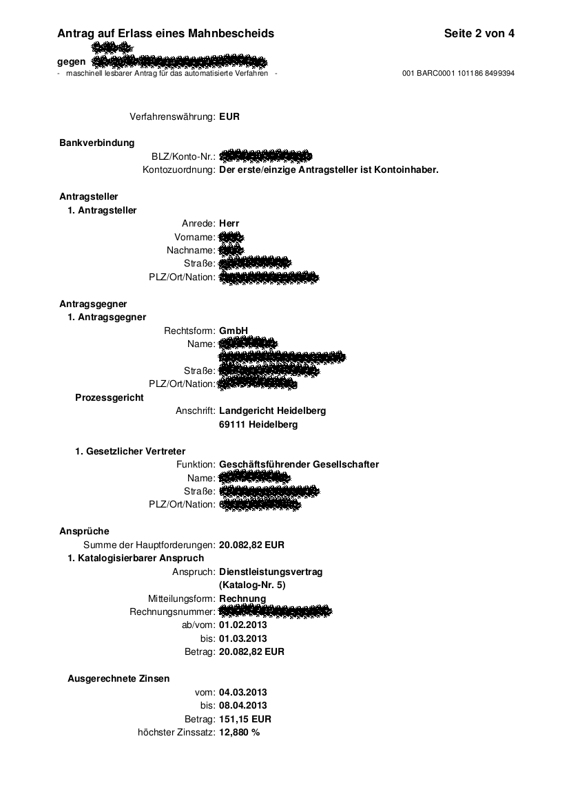 Seite 2 von 4: Antrag auf Erlass eines Mahnbescheids, "Online"-Version, Adressen und einige andere Daten geschwärzt